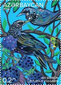 Regional Rabitə Birliyi ölkələrinin birgə buraxılışı-2018. Qoruqlar. "Qarayazı dövlət təbiət qoruğu". 6 markadan ibarət kiçik vərəq. Dövriyyəyə buraxıldığı tarix: 27 dekabr 2018 Kataloq №: 1518-1523 Kiçik vərəqin ölçüsü: 151x144 mm Markanın ölçüsü: 37x52 mm Perforasiya: çərçivəli, 13 ¼ Rəssam: Nərmin Abdullayeva Dizayn: Anar Mustafayev Çap olunub: Bobruisk Integrated Printing House, Belarus, Bobruysk şəhəri Tiraj: 10 000 vərəq Vərəqə daxil olan markalar: 1. № 1518. Texas ağacdələni. 0.2 AZN 2. № 1519. Qaratoyuq. 0.3 AZN 3. № 1520. Hildebrandt sığırçını. 0.6 AZN 4. № 1521. Adı sığırçın. 0.2 AZN 5. № 1522. Qırqovul. 0.3 AZN 6. № 1523. Şanapipik. 0.6 AZN Birinci gün zərfləri: 200 ədəd